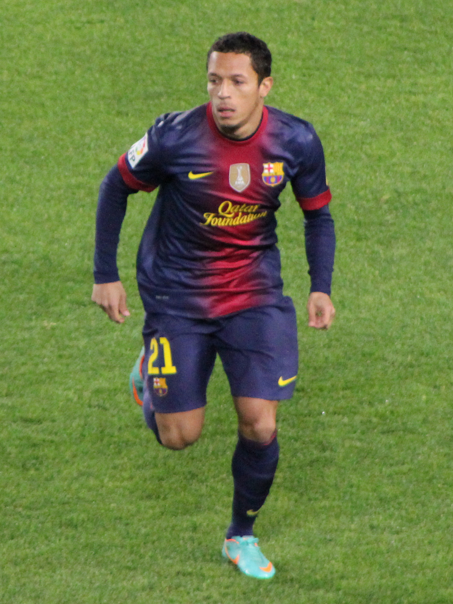 Adriano Correia, futbolista brasileño del FC Barcelona, durante un partido de la temporada 2012-13.